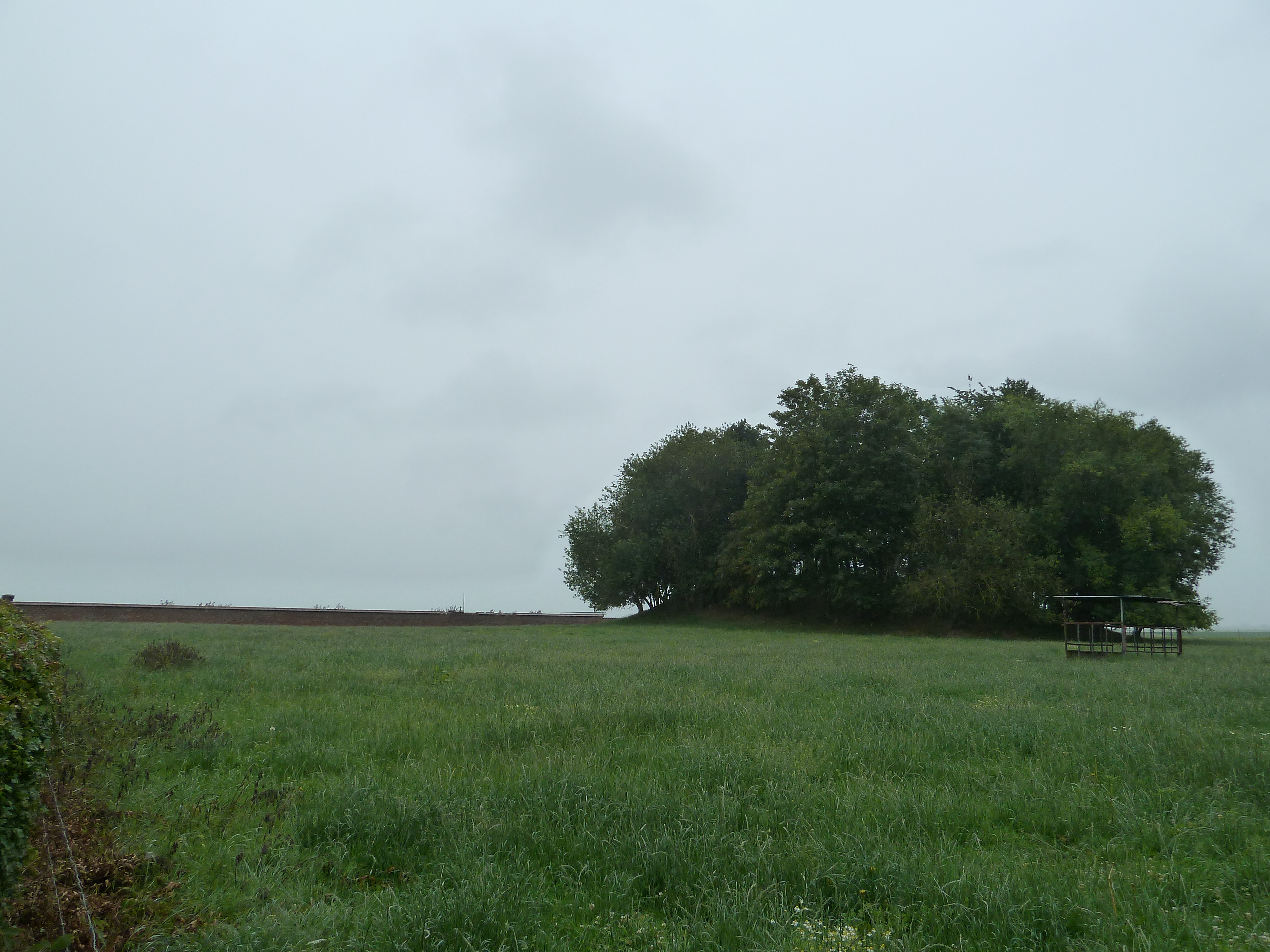 Tumulus d'Oleye, Oleye, Belgique